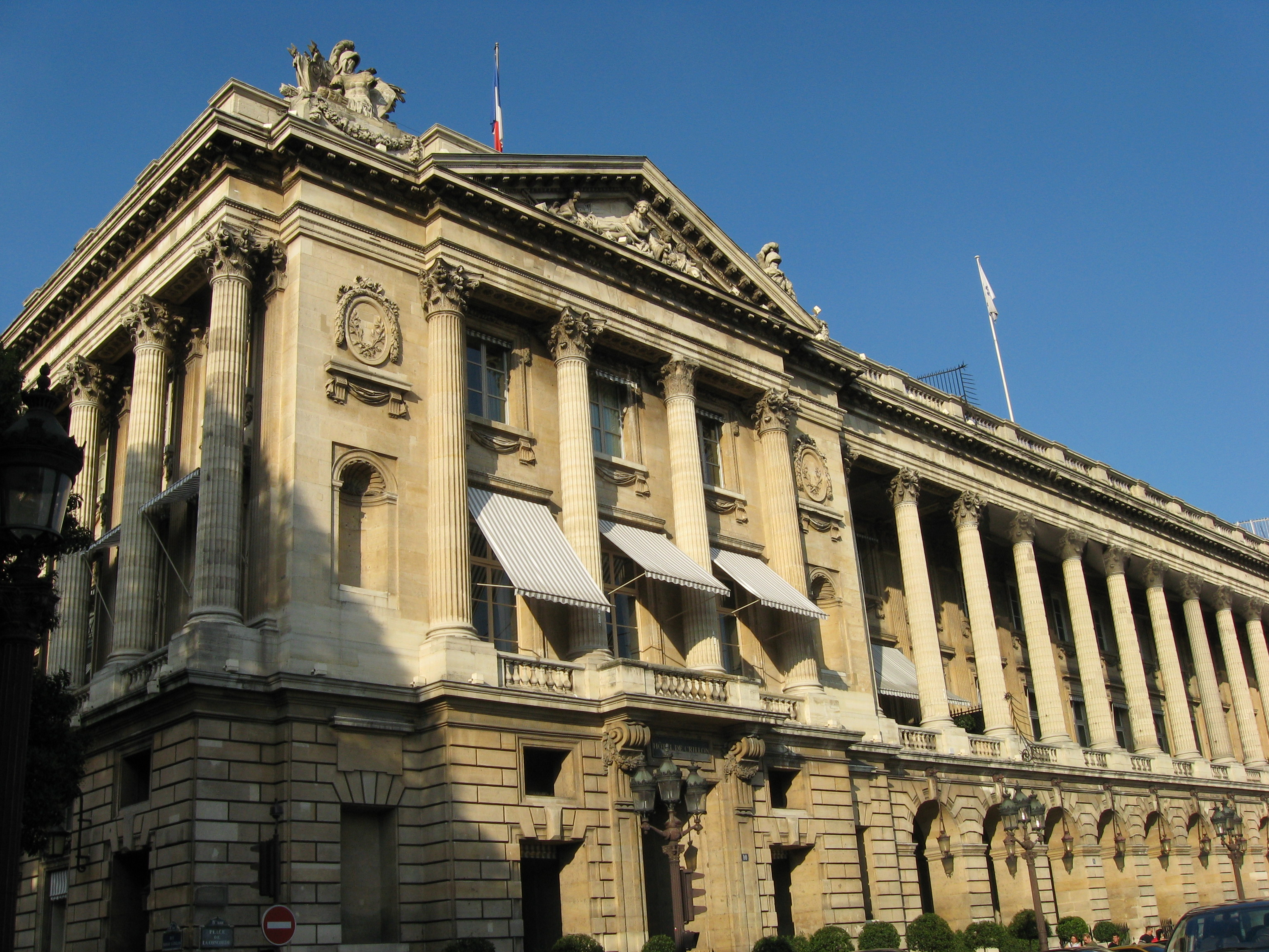 Hôtel de Crillon Paris